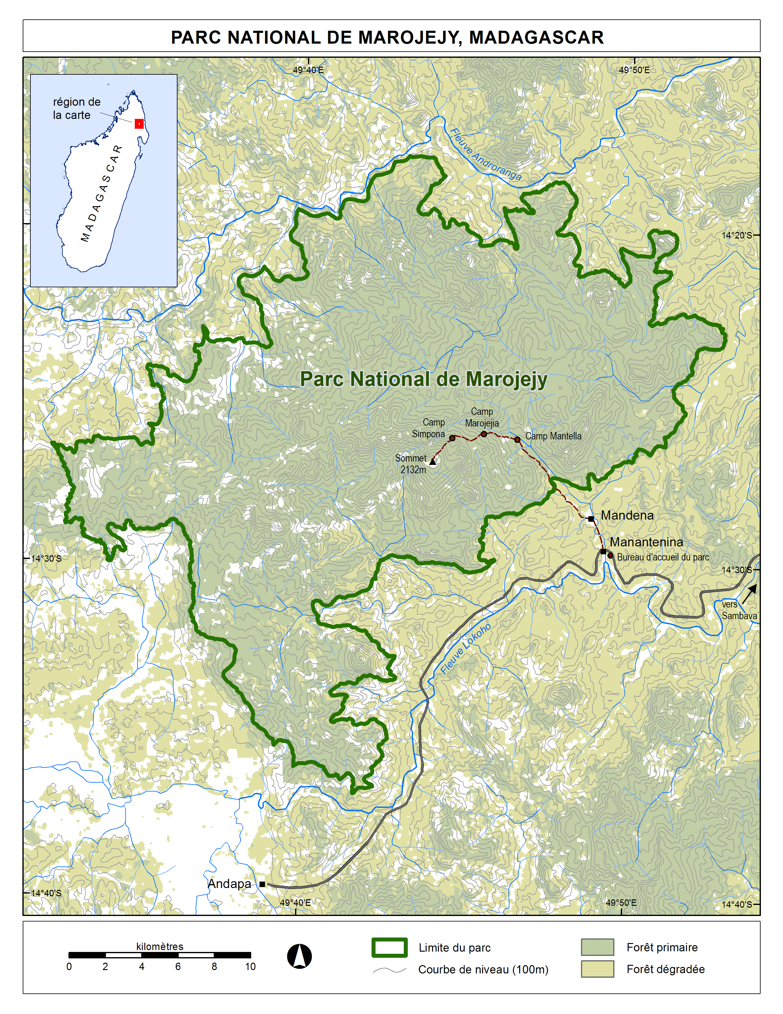 Carte représentant les limites, et les forêts (primaires / dégradées), la piste depuis le centre d'accueil des visiteurs et les routes vers les villes avoisinantes.